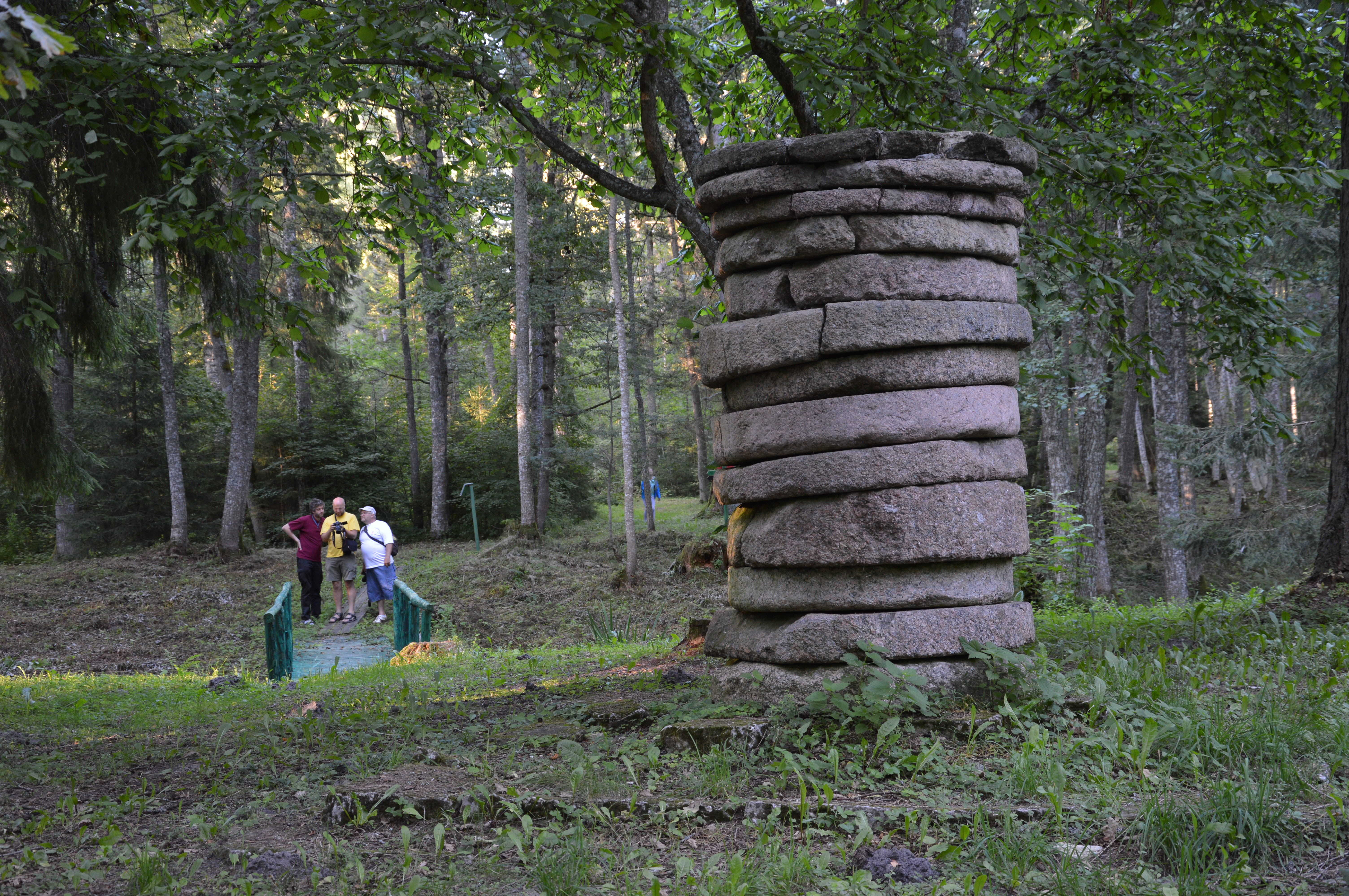 Vana-Vigala Hirvepark